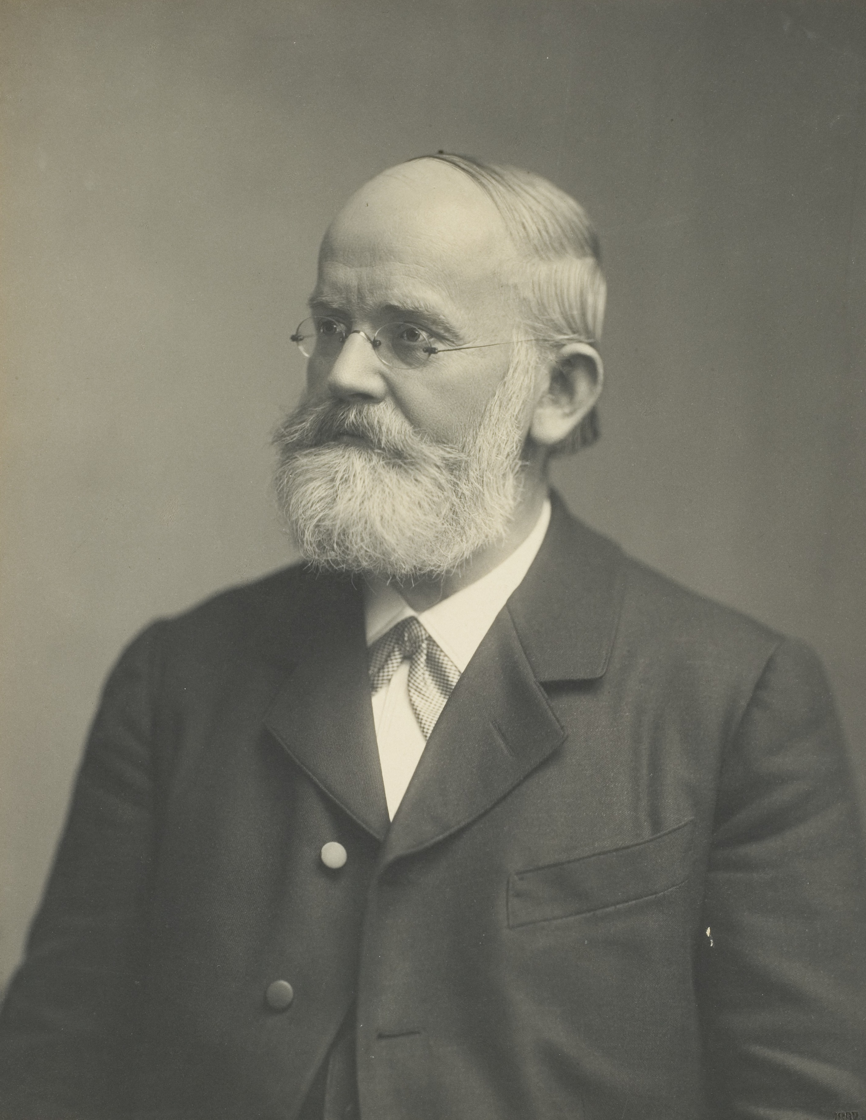 Bernhard Erdmannsdörffer, Historiker, 1874–1901 Professor in Heidelberg, 1884 Rektor